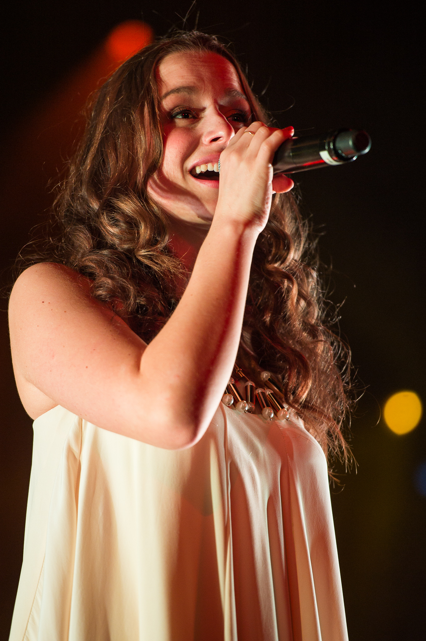 Concertbüro Franken,Heinrich-Lades-Halle,Konzert,Livekonzert,Livemusik,Musik,Oonagh,Senta-Sofia Delliponti